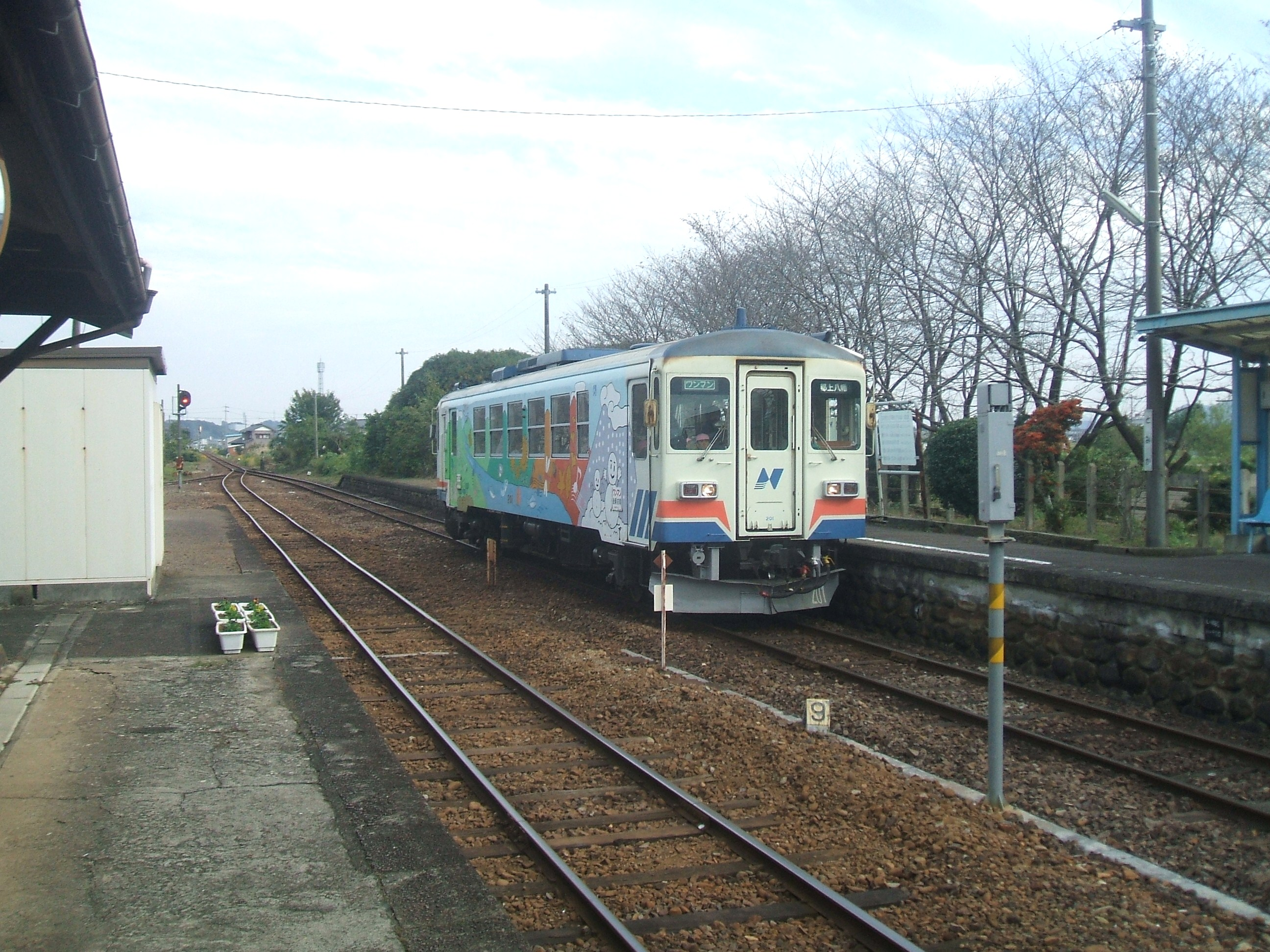 駅に停車中の200型